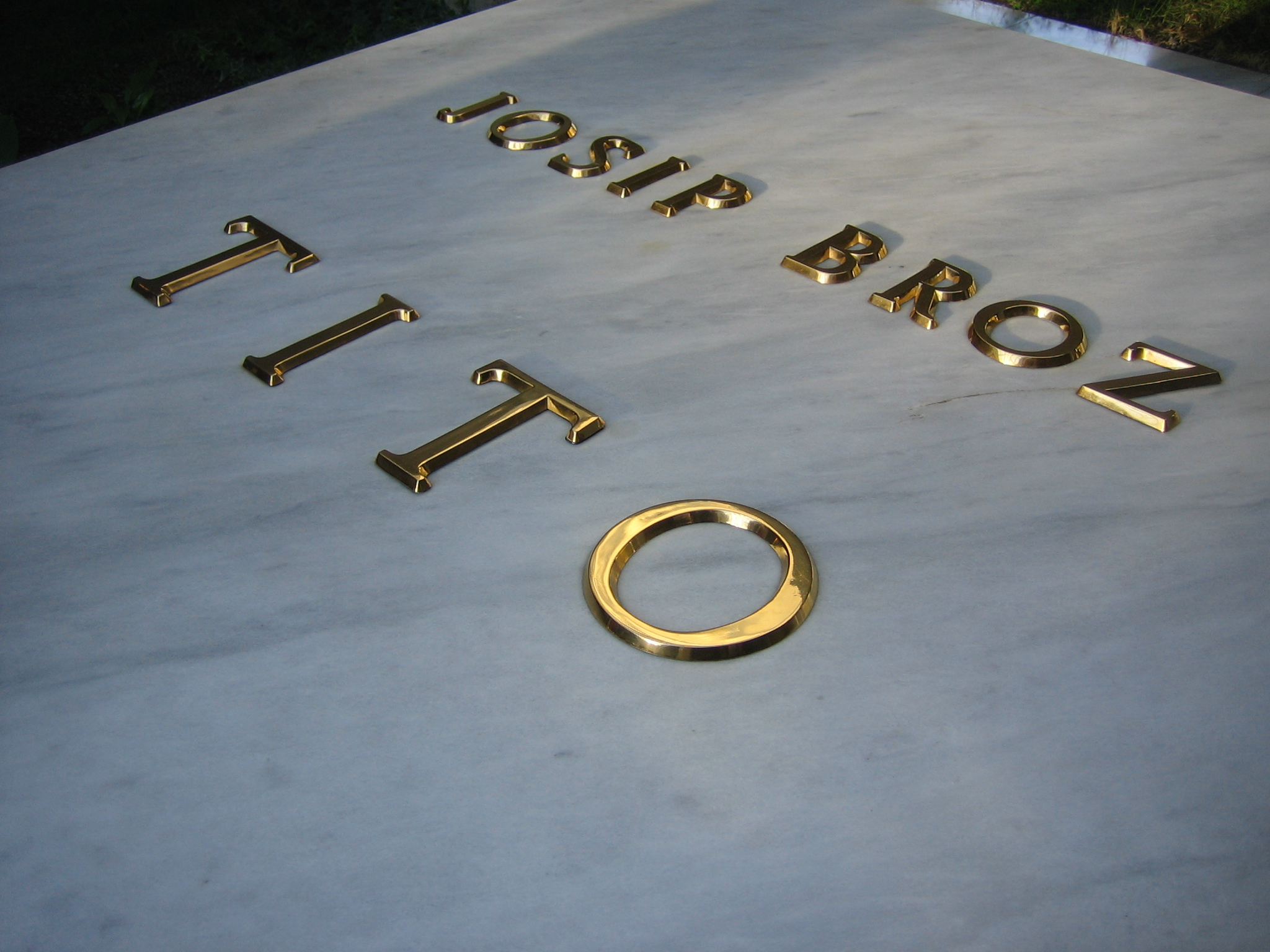 Tumba de Tito en Belgrado